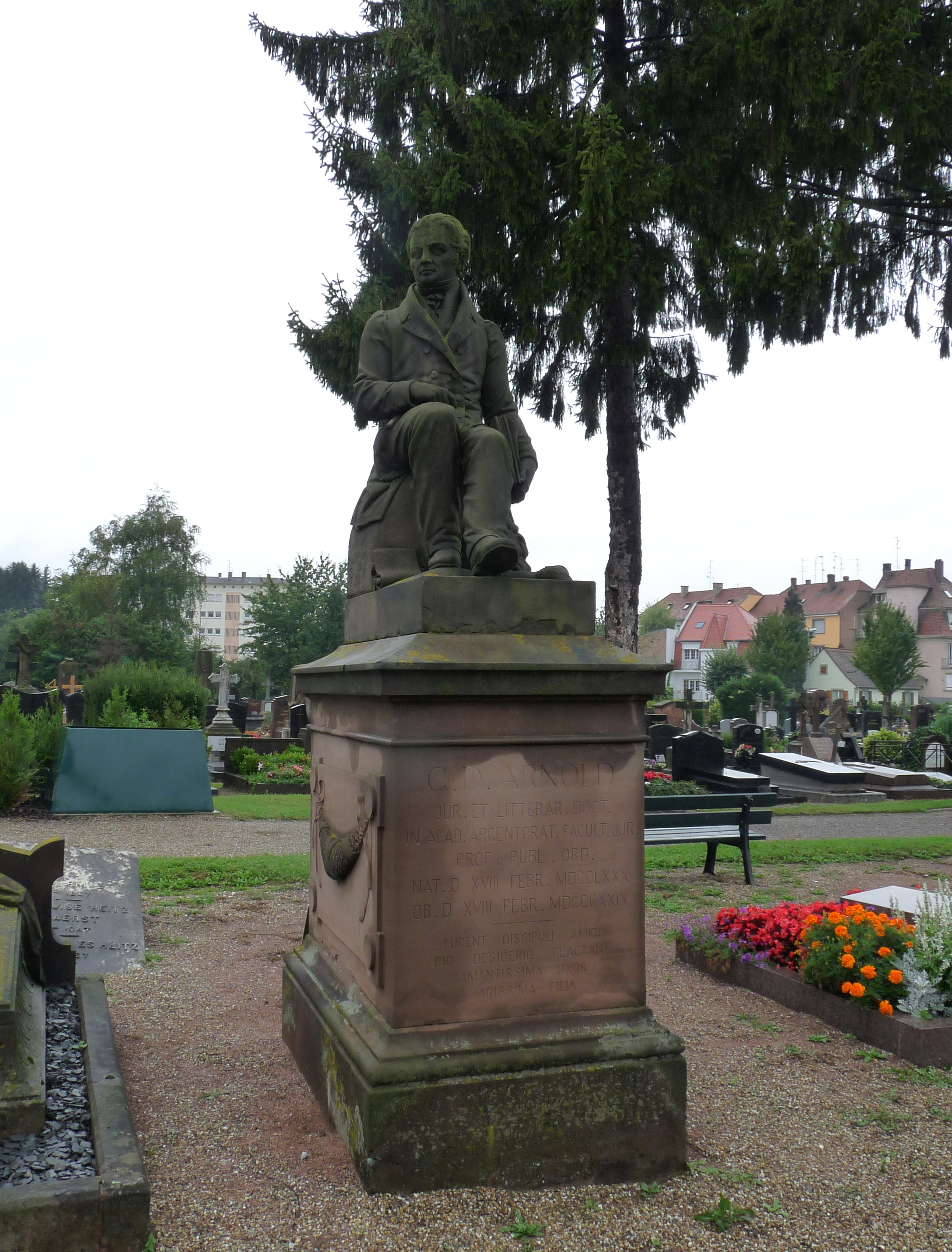 Monument à Jean Georges Daniel Arnold sculpté par André Friedrich. Cimetière Saint-Gall de Strasbourg